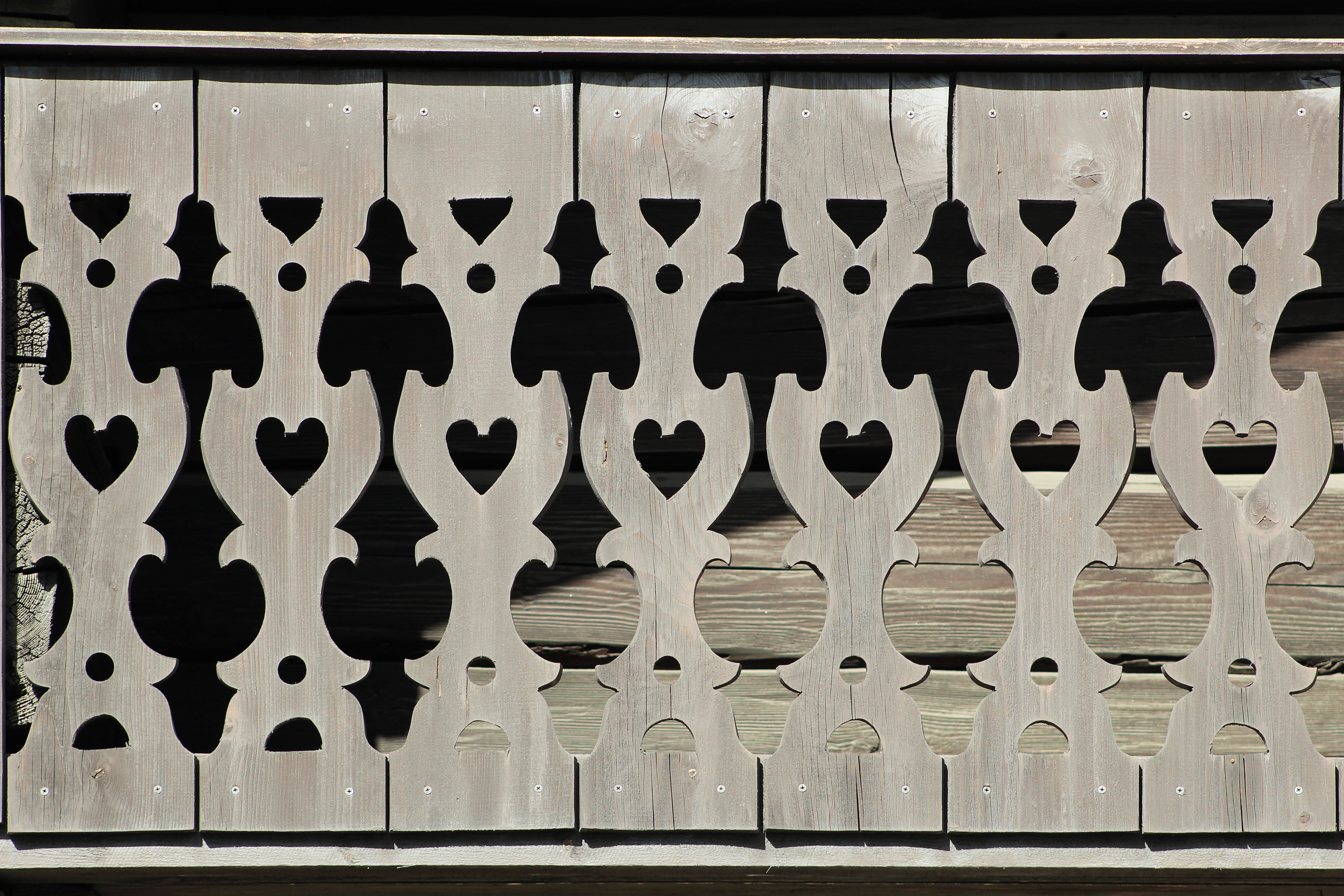 Volary